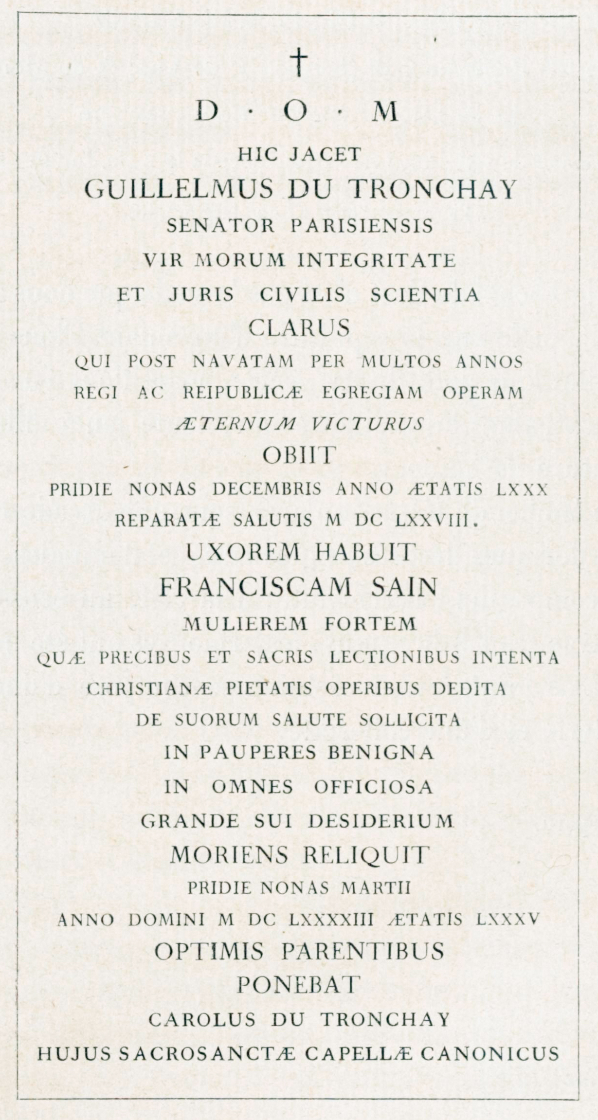 Relevé de la pierre tombale de Guillaume et Françoise du Tronchay.